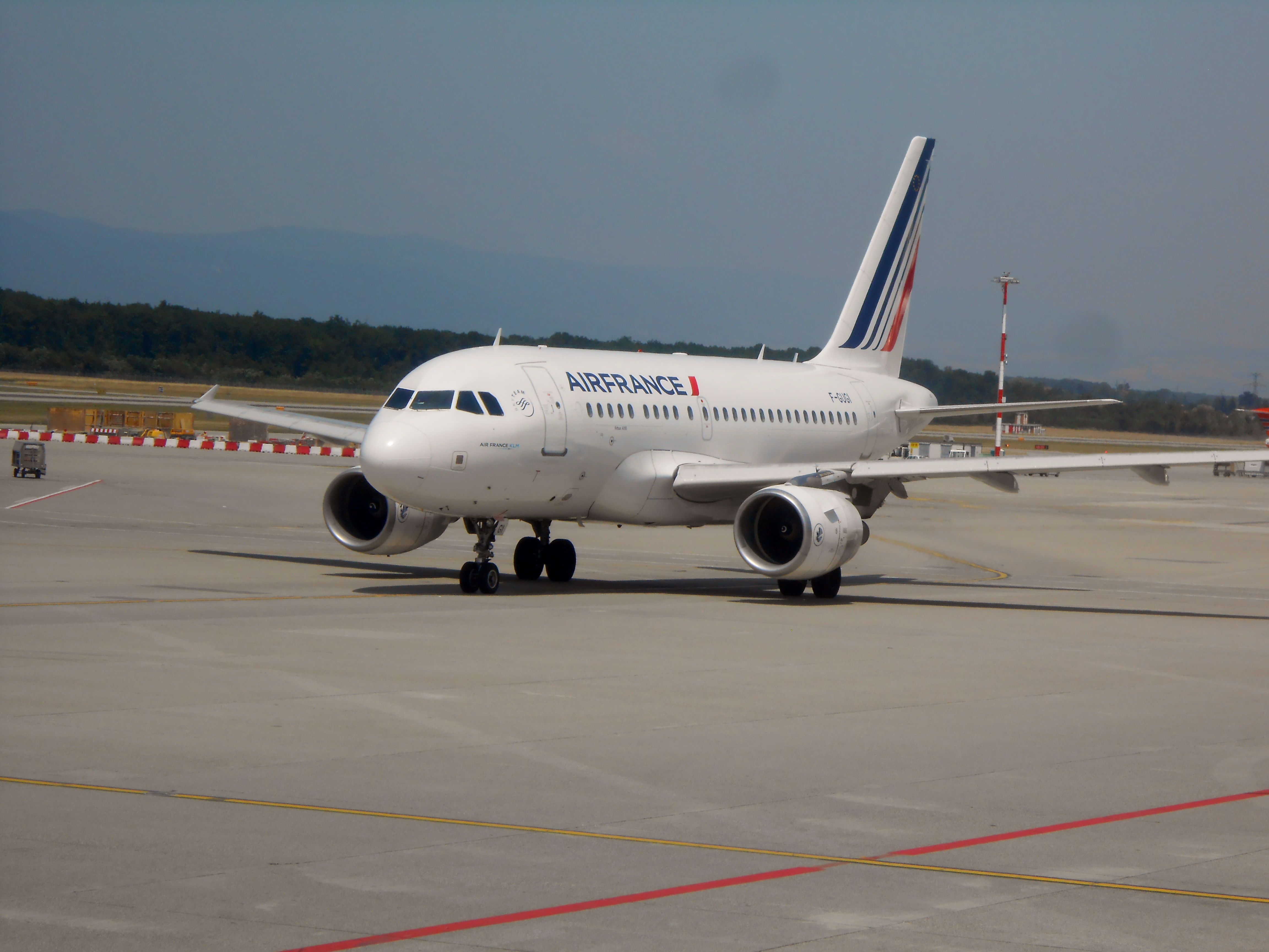 Airbus A318-111 d'Air France immatriculé F-GUGI à l'aéroport de Genève.